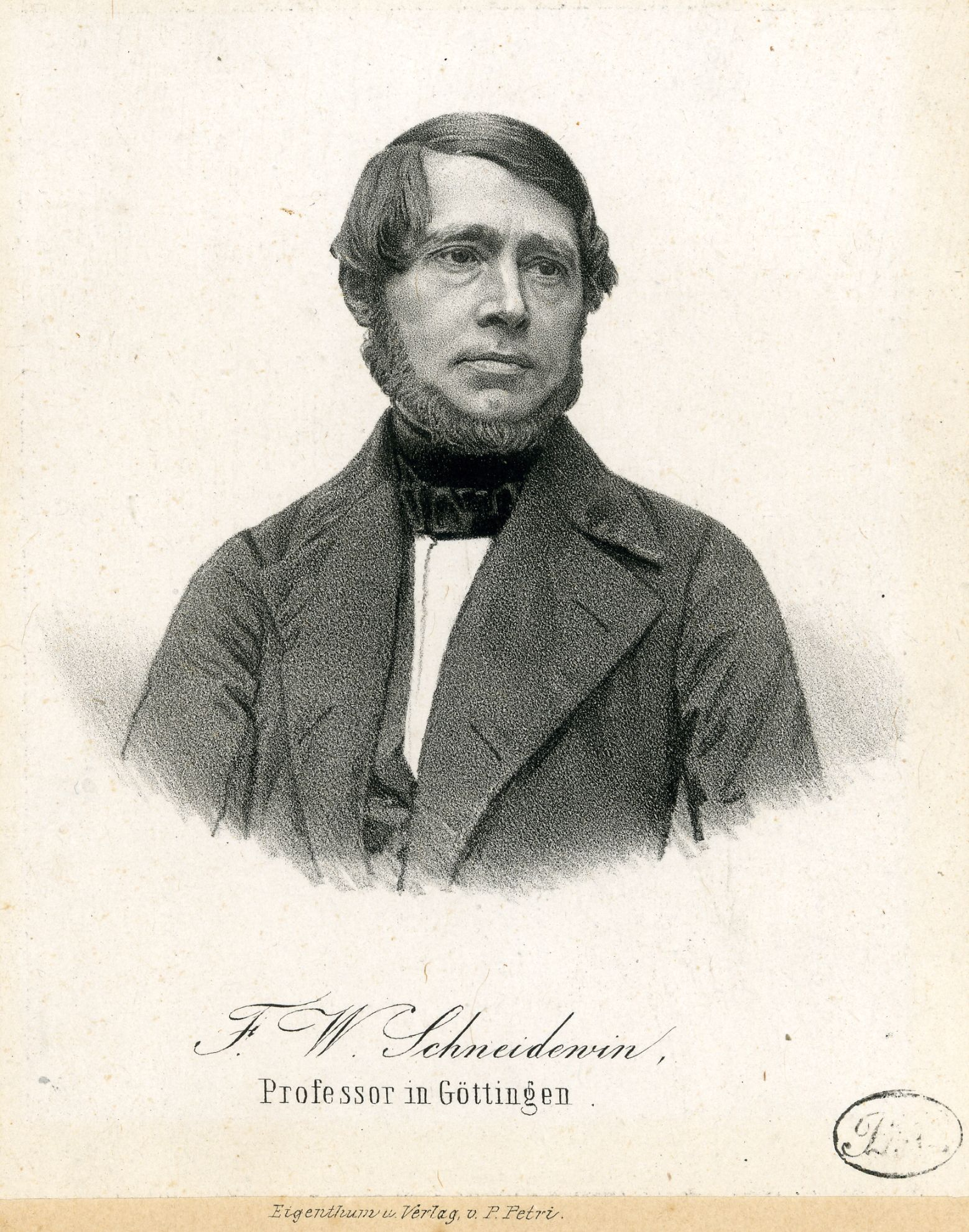 Friedrich Wilhelm Schneidewin (1810—1856), German classical scholar